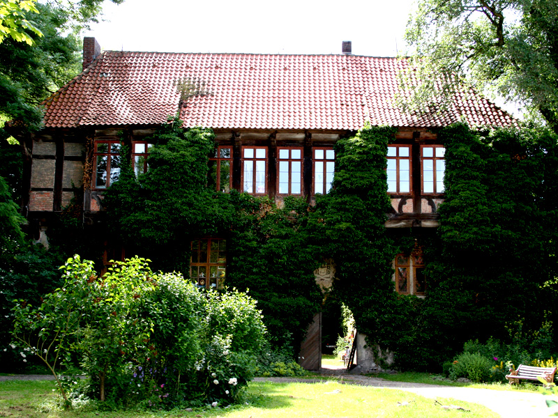 Schloß Brokeloh bei Landesbergen, Kreis Nienburg/Weser